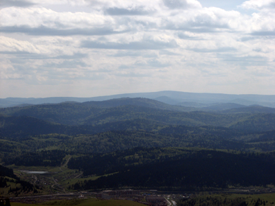 Горная Шория. Окрестности Таштагола